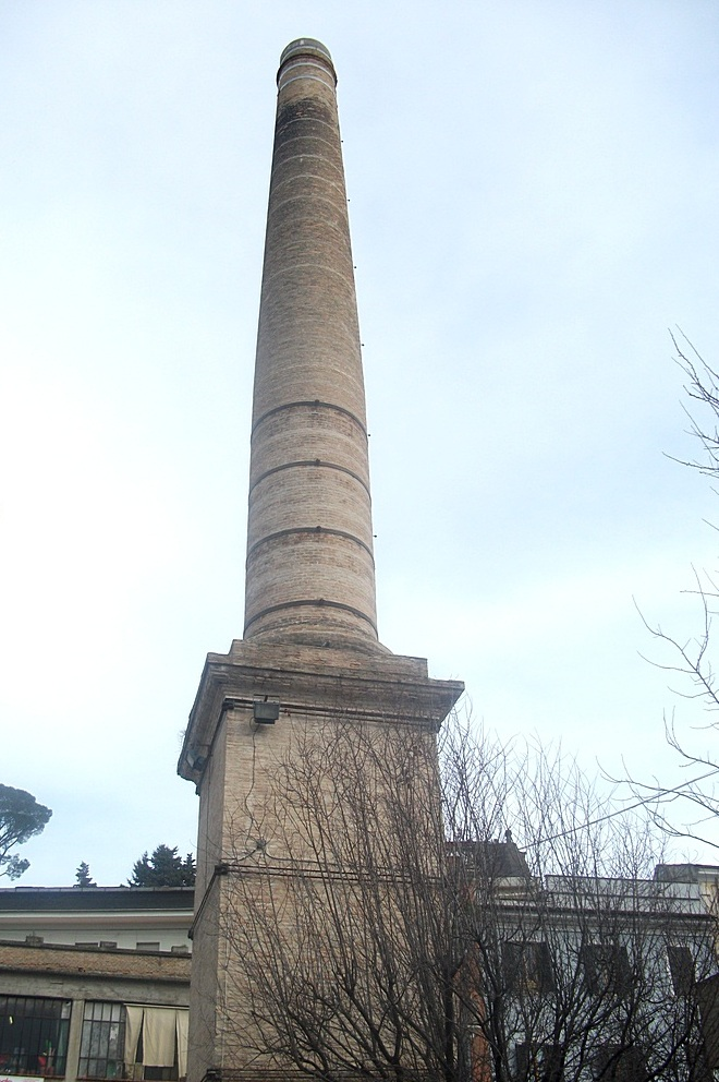 Poggio Mirteto archeologia industriale,la ciminiera dell'ex vetreria dei primi dell'800.jpg